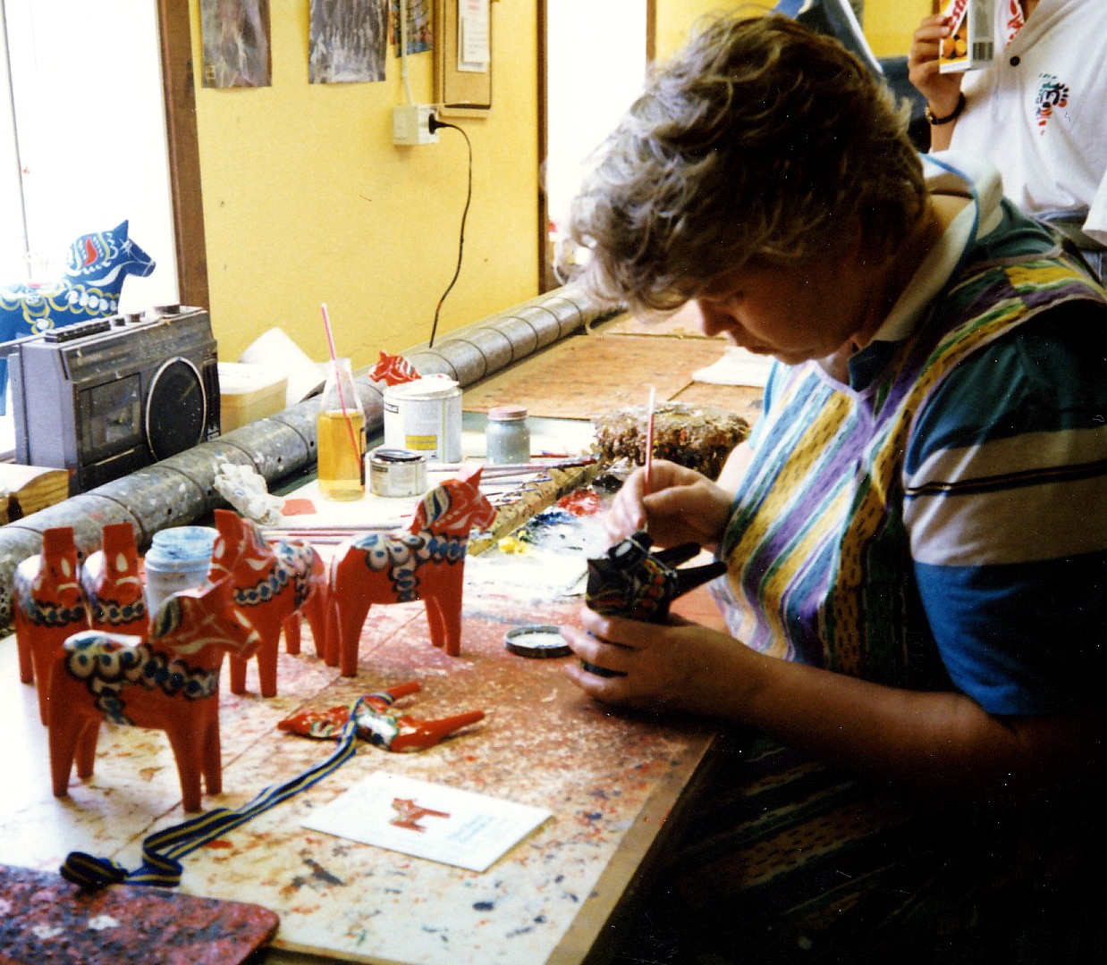 Dalahästtillverkning